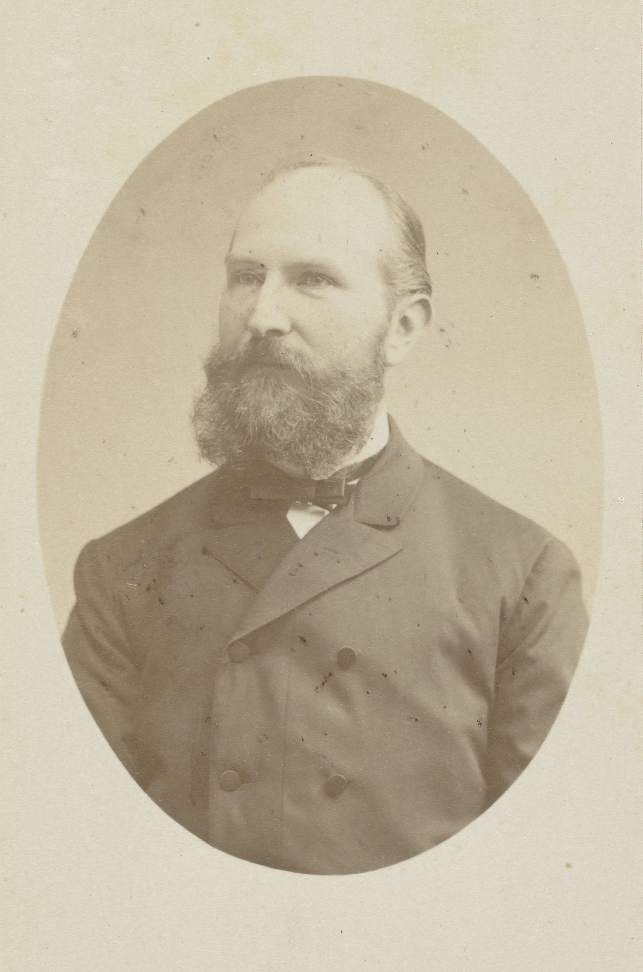 Friedrich Julius Peter van Calker (Bonn, 29 augustus 1841 - Groningen, 16 juli 1913) was een Duits-Nederlands geoloog, paleontoloog en mineraloog. Hij was als hoogleraar verbonden aan de Rijksuniversiteit Groningen